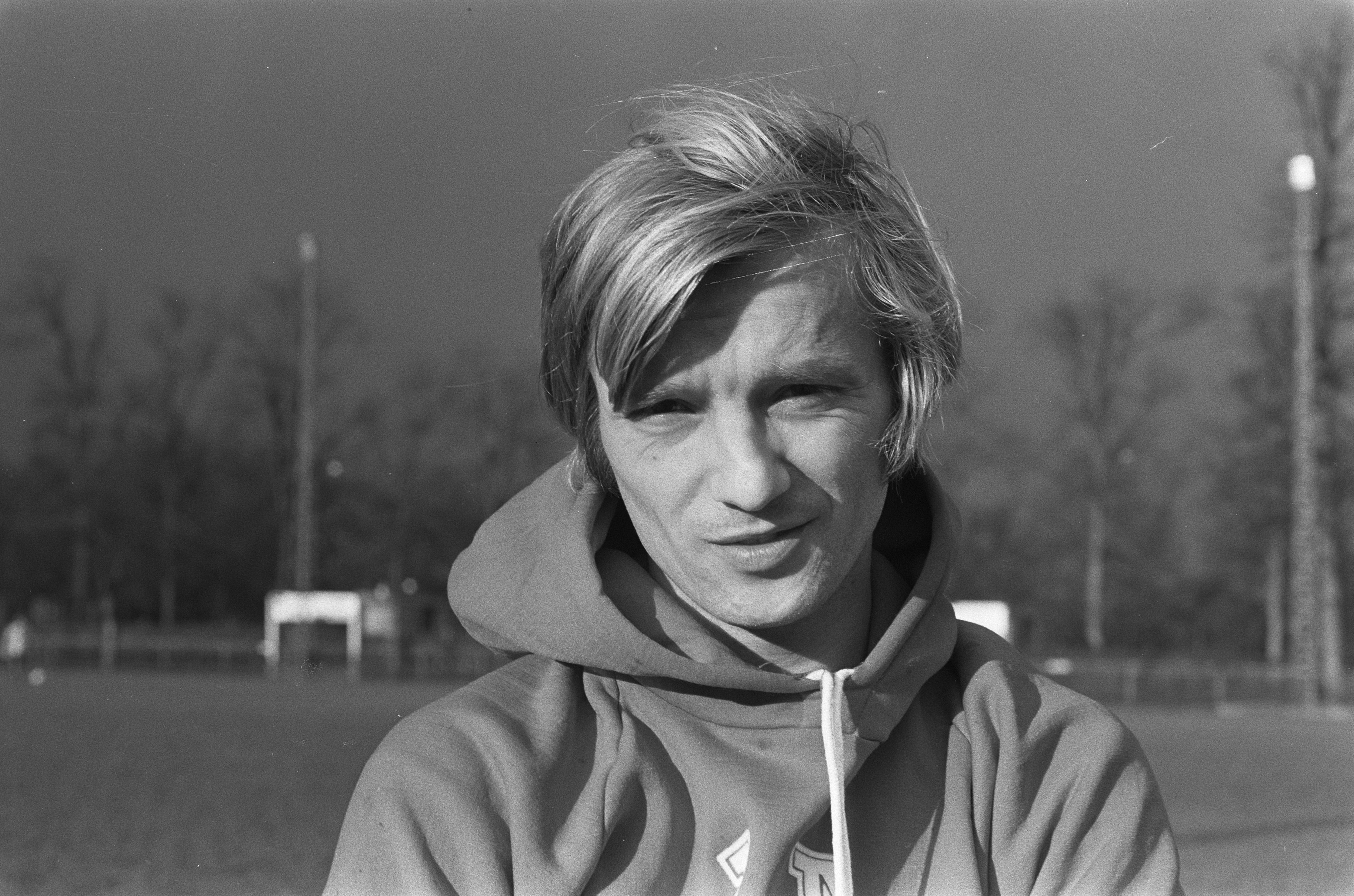 Photographie du nouveau joueur hongrois de l'Ajax Zoltán Varga par Hans Peters / Anefo (1973).